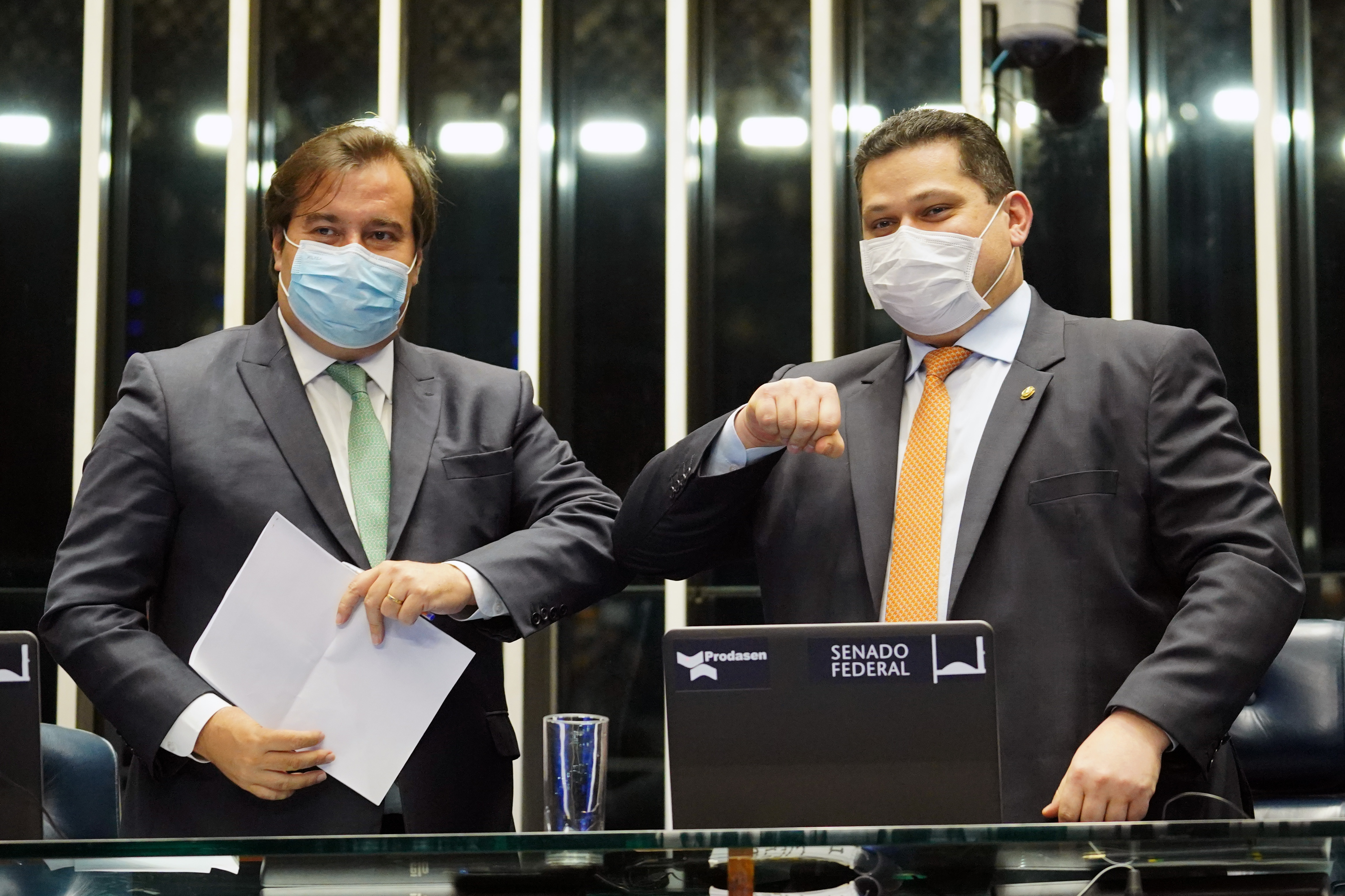 Rodrigo Maia e Davi Alcolumbre utilizando máscara de proteção durante a pandemia de COVID-19.